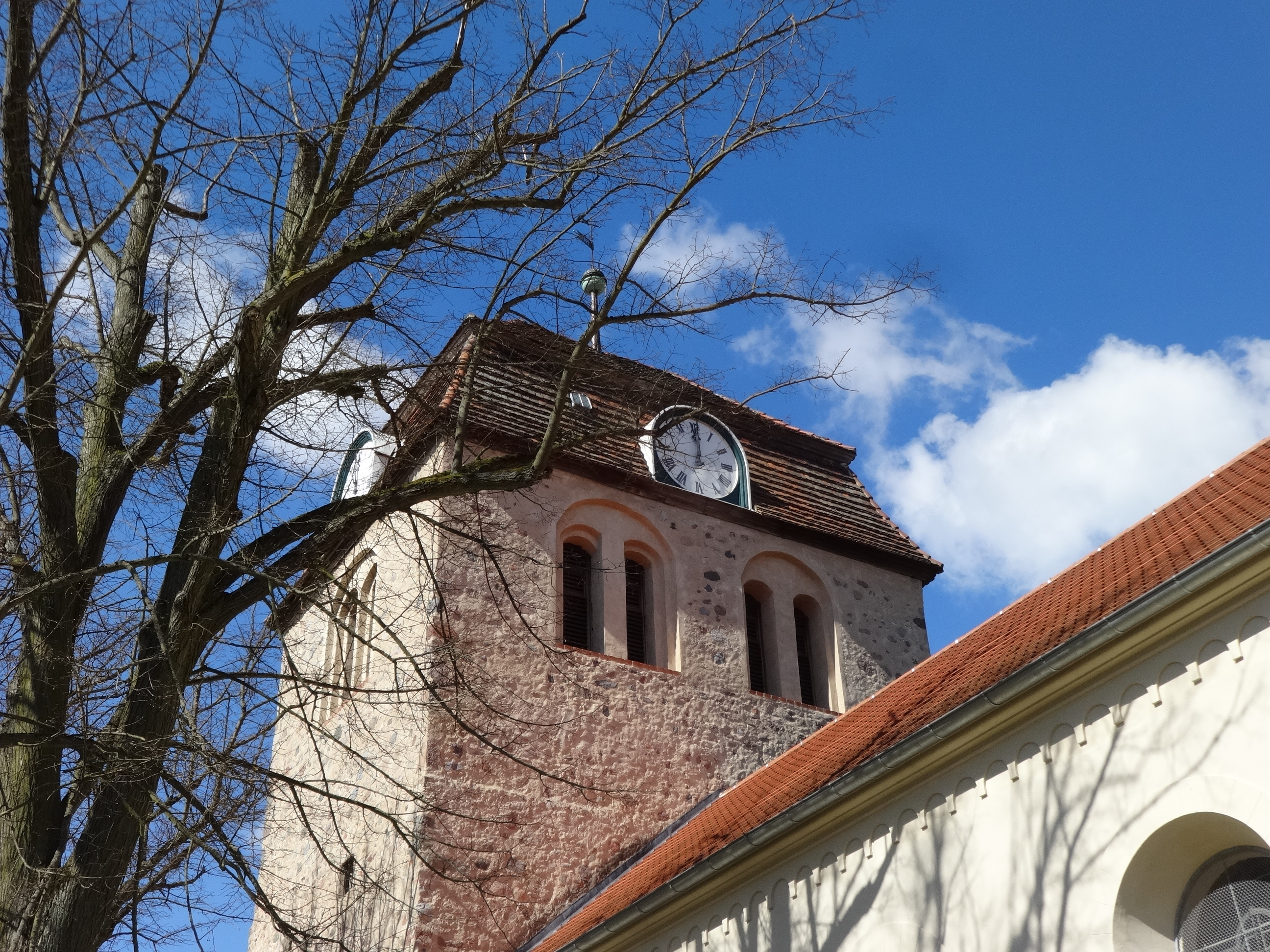 Die Dorfkirche Görzke entstand um 1200 als romanischer Feldsteinbau mit langgestrecktem Chor und Apsis. Über die Entstehungsgeschichte ist bislang nicht viel bekannt. 1882 erfolgten erhebliche Umbauarbeiten. Aus dieser Zeit stammen sowohl die Kanzel wie auch das Gestühl. Ein Taufengel stammt aus dem Anfang des 18. Jahrhundert. Weiterhin befinden sich der Kirche mehrere Epitaphe derer von Schierstedt.